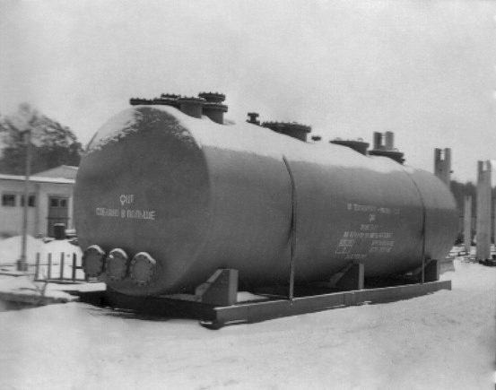 Zbiornik wykonany w Przedsiębiorstwie Montażowym „Montoerg”